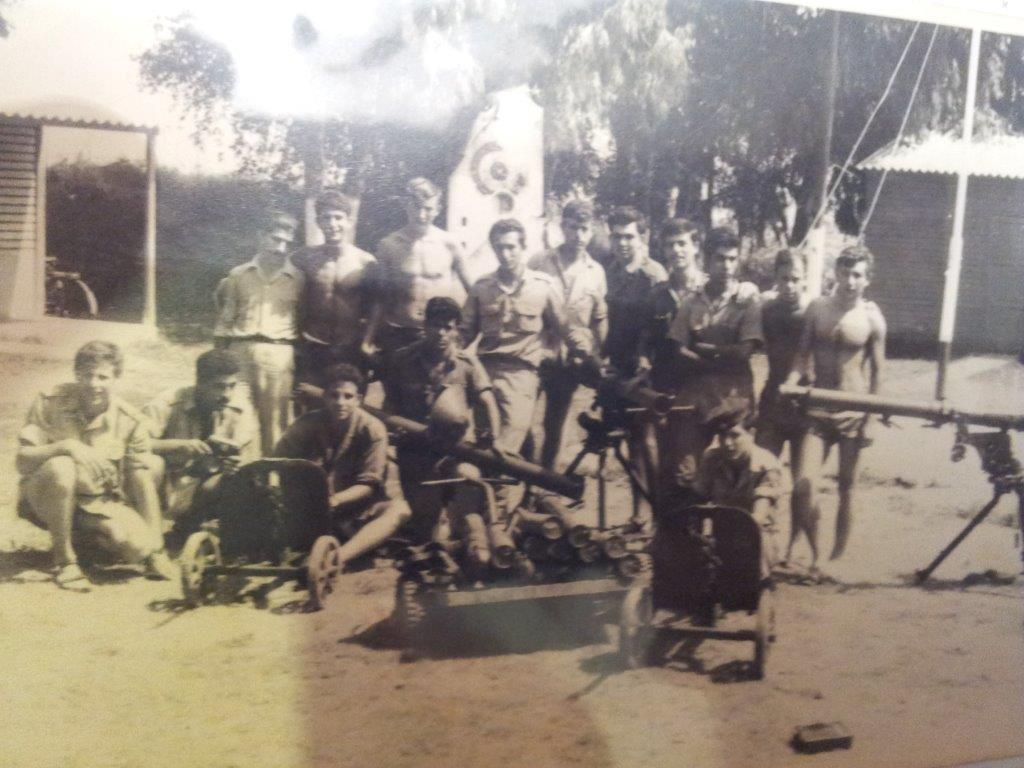 אנשי פלגה 788 עם נשק שלל מהמוצבים הסוריים בחוף הכנרת